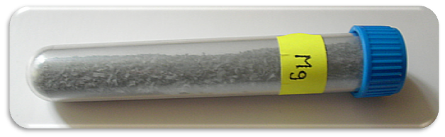 Práškový hořčík